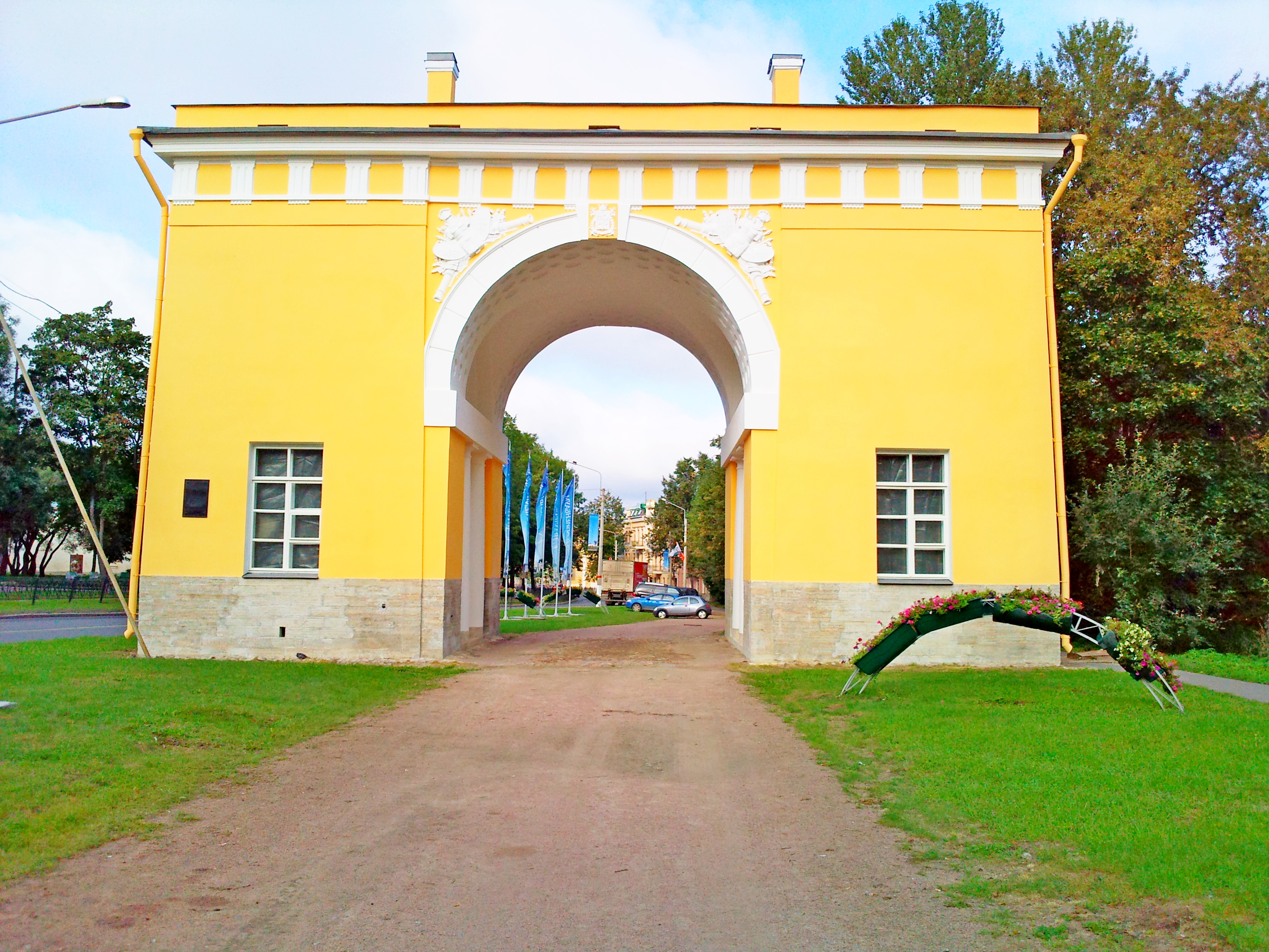 Городские ворота, Ломоносов)